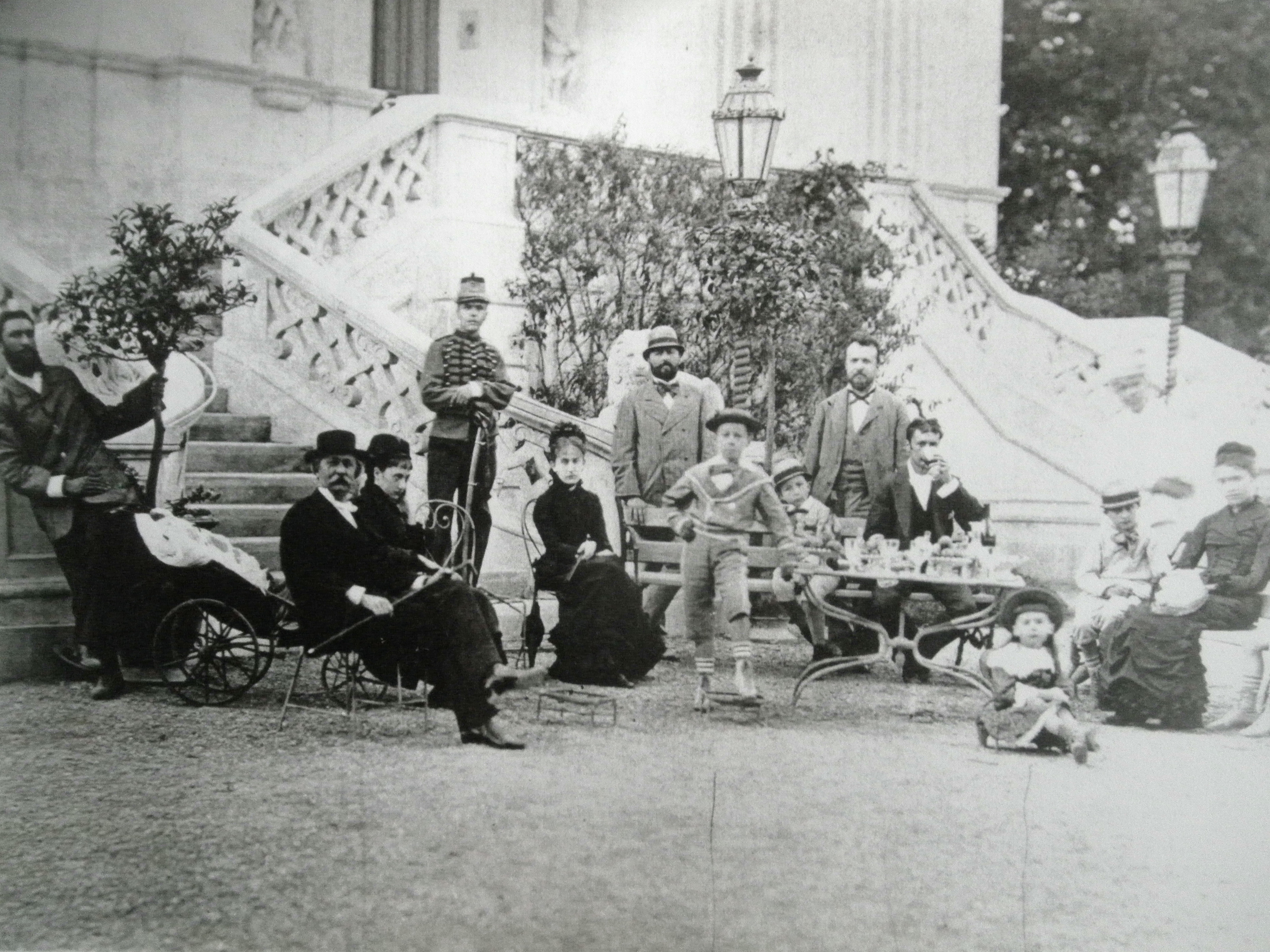 Famille bonnasse1 vers 1887